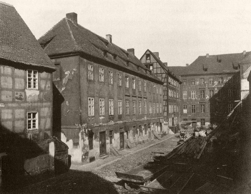 Pasaż Pokoyhof, wygląd przed rokiem 1911.